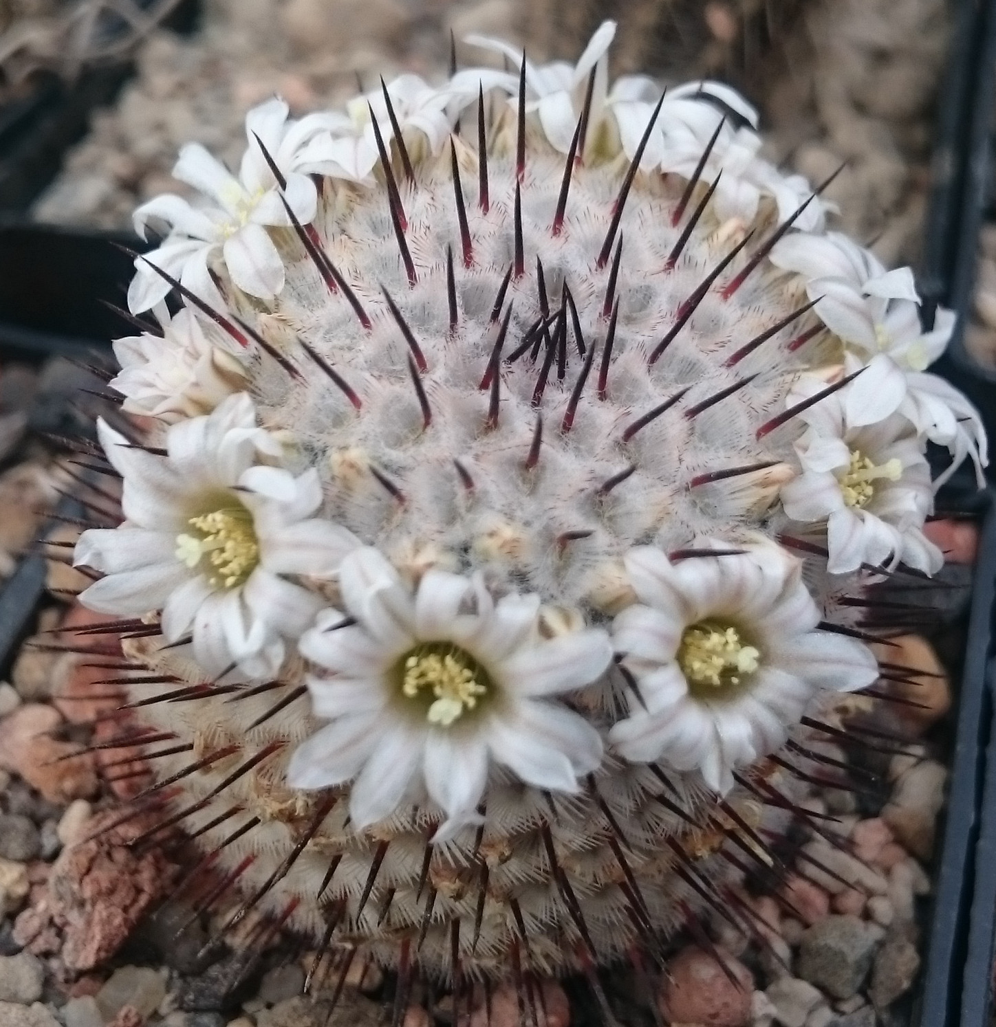 Mammillaria perezdelarosae subsp. andersoniana in Kultur